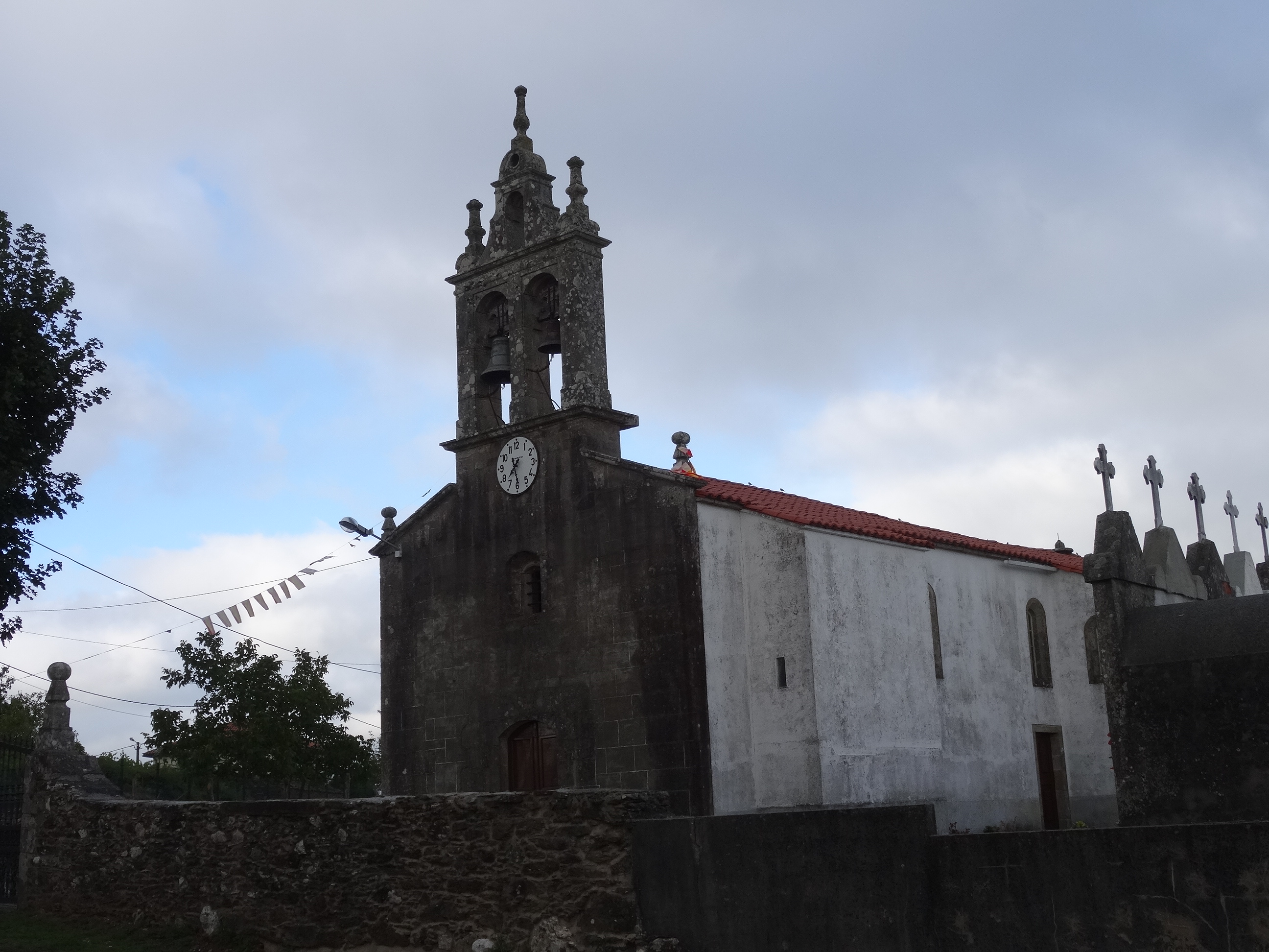 Igrexa da parroquia de Visantoña no concello de Santiso, na provincia da Coruña.